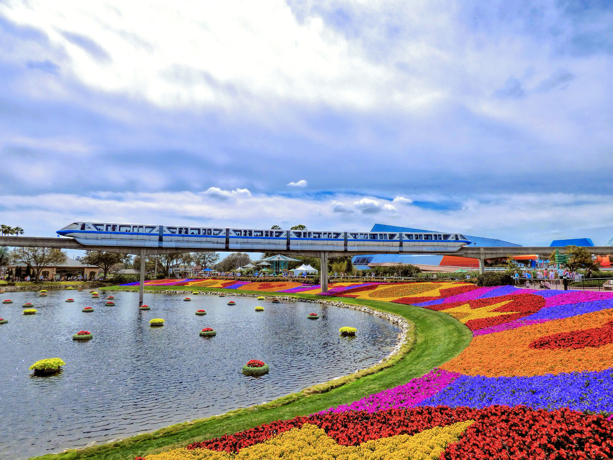 Epcot_FlowerandGarden_2016_11